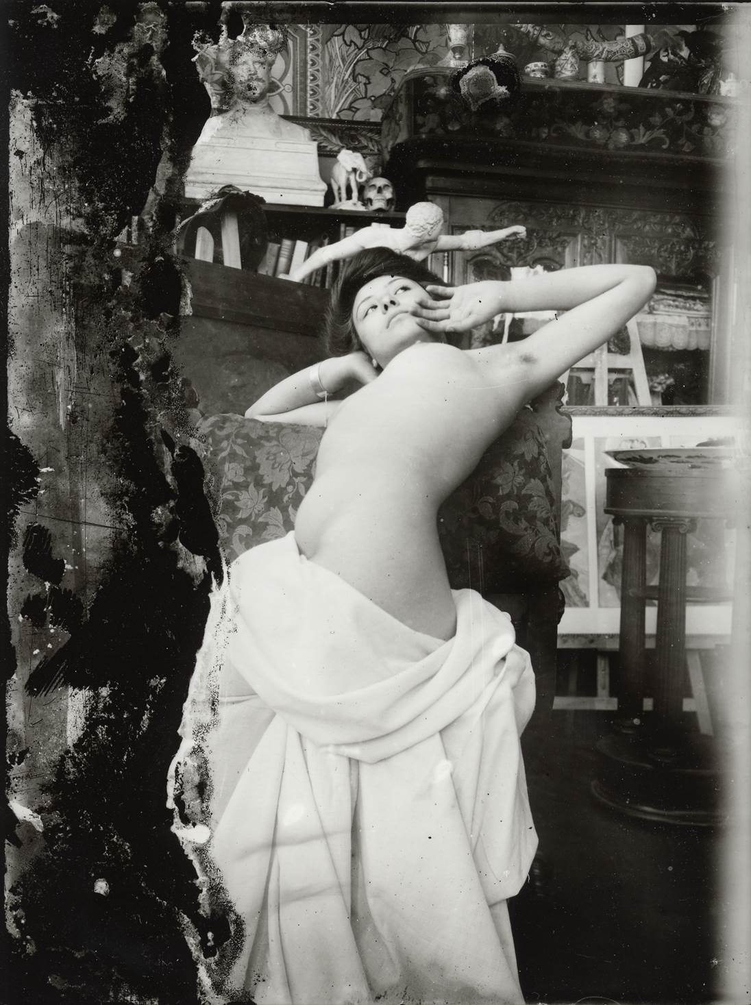 Model posing in Alphonse Mucha's studio, Rue du Val de Grâce, Paris (1902-1903).